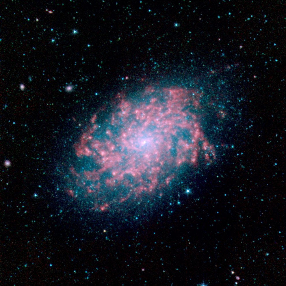 NGC 7793 vom Spitzer Telescope